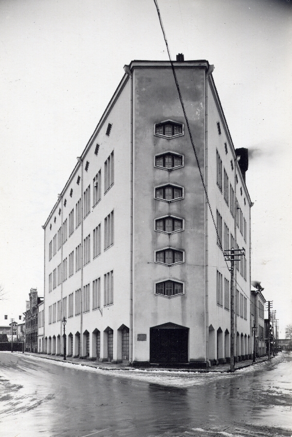 Rauaniidi tehas Tallinnas Põhja pst 7.